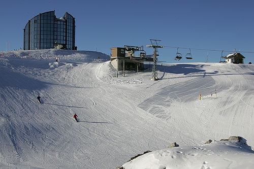 Leysin: Restaurant Tournant Kuklos (La Berneuse)